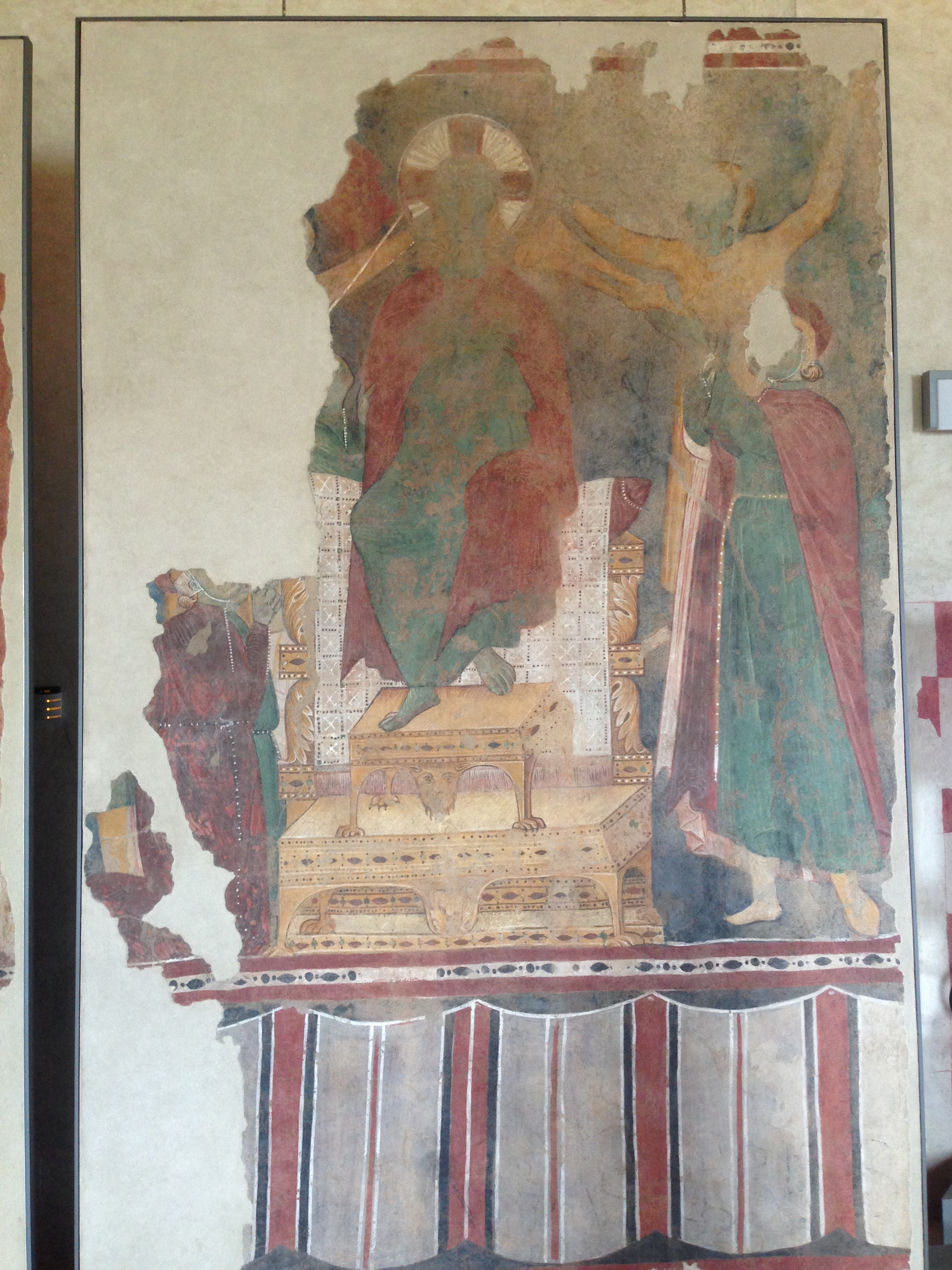 Maestro delle Palazze. Derisione di Cristo. Spoleto